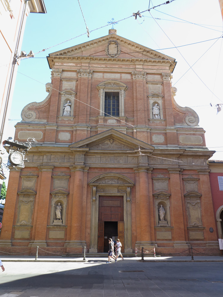 Chiesa di San Paolo Maggiore This is a photo of a monument which is part of cultural heritage of Italy.